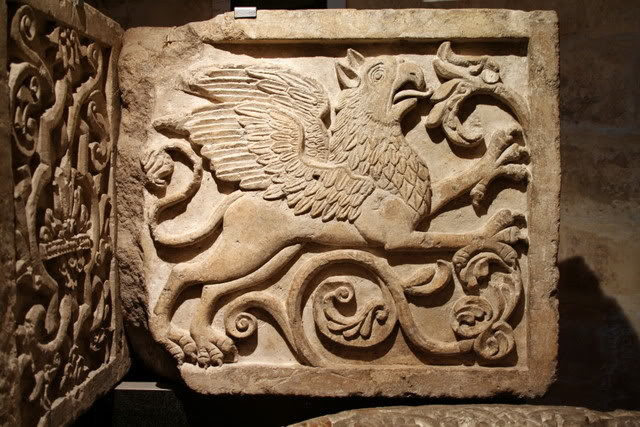 Детали Львиных ворот. В настоящее время в демонтированном виде хранятся в Государственном музее-заповеднике «Коломенское», где скульптуры львов экспонируются в помещении Сытного двора (XVII в.)